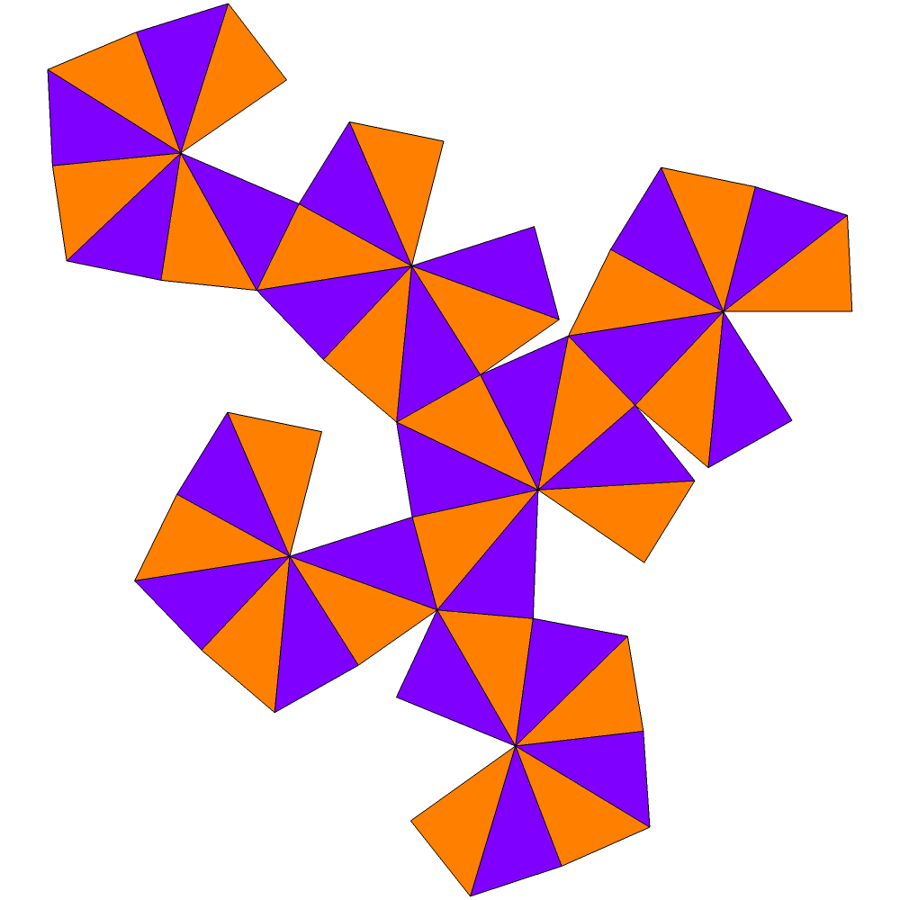 Disdyakisdodecahedron net